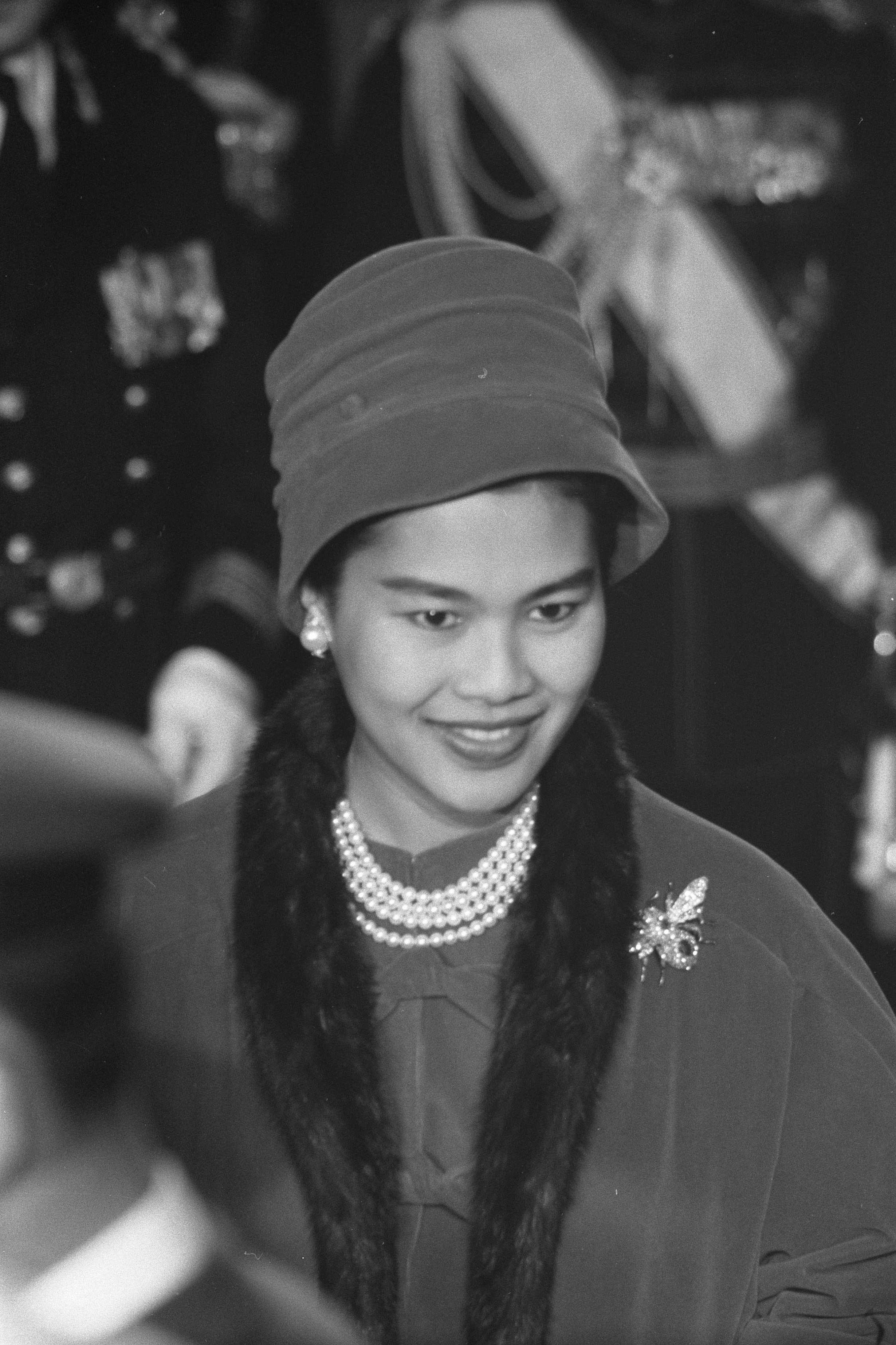 Collectie / Archief : Fotocollectie Anefo Reportage / Serie : [ onbekend ] Beschrijving : Aankomst Koning Bhumibol en Koningin Sirikit te Den Haag, koningin Sirikit Datum : 24 oktober 1960 Locatie : Den Haag, Zuid-Holland Trefwoorden : aankomsten Persoonsnaam : Sirikit, koningin van Thailand Fotograaf : Pot, Harry / Anefo Auteursrechthebbende : Nationaal Archief Materiaalsoort : Negatief (zwart/wit) Nummer archiefinventaris : bekijk toegang 2.24.01.05 Bestanddeelnummer : 911-6994